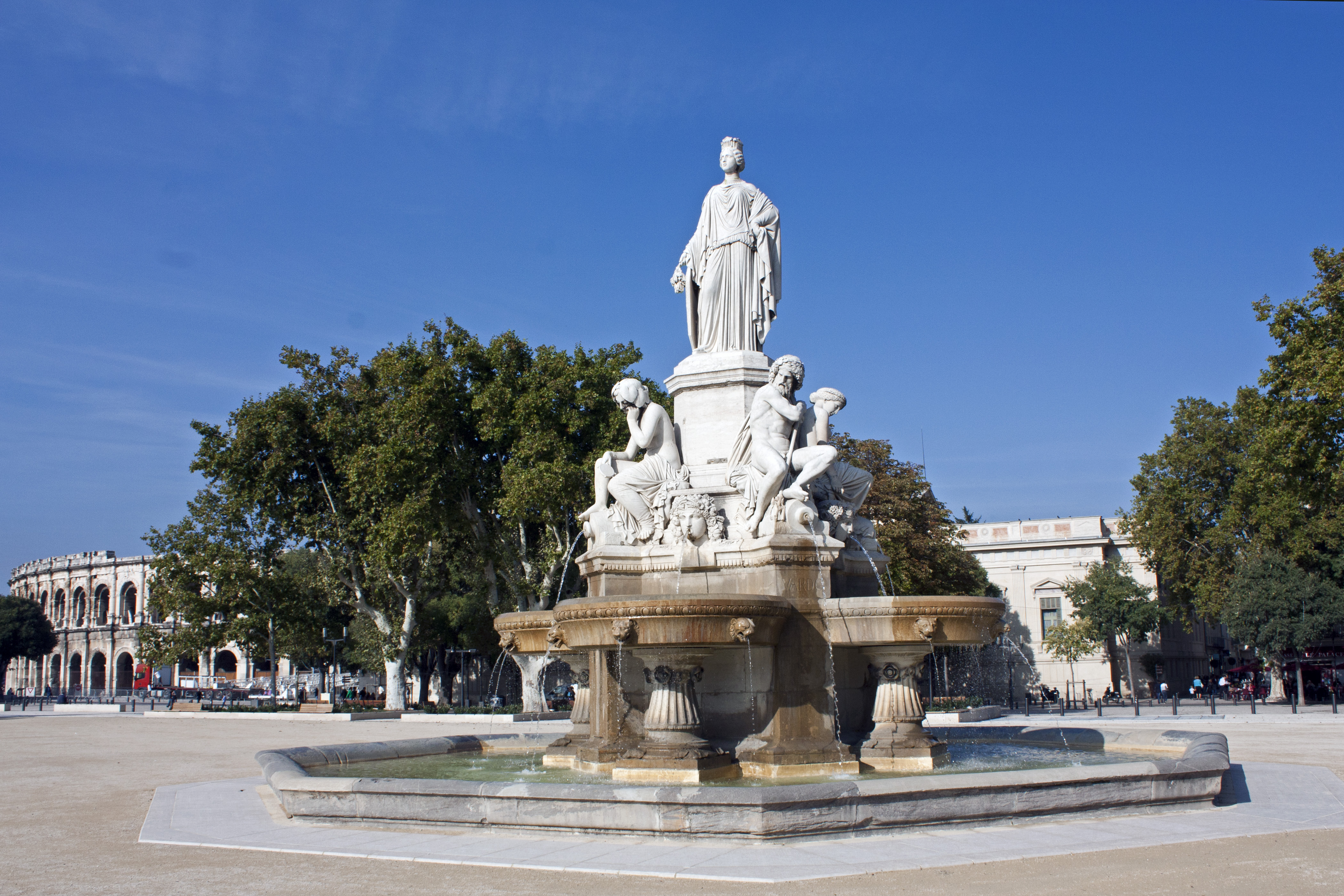 Nîmes (Gard, France), fountain Pradier, Esplande square.